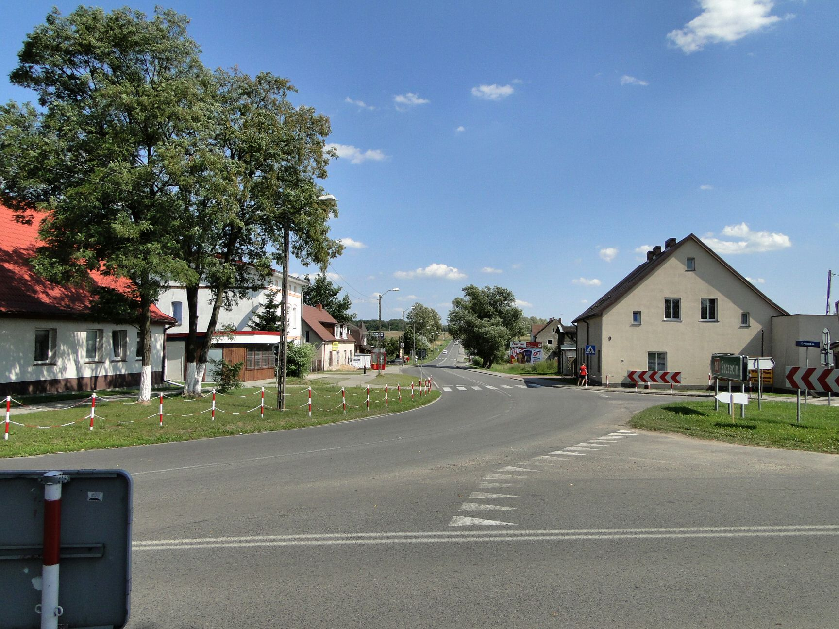 Dołuje - droga w kierunku Szczecina